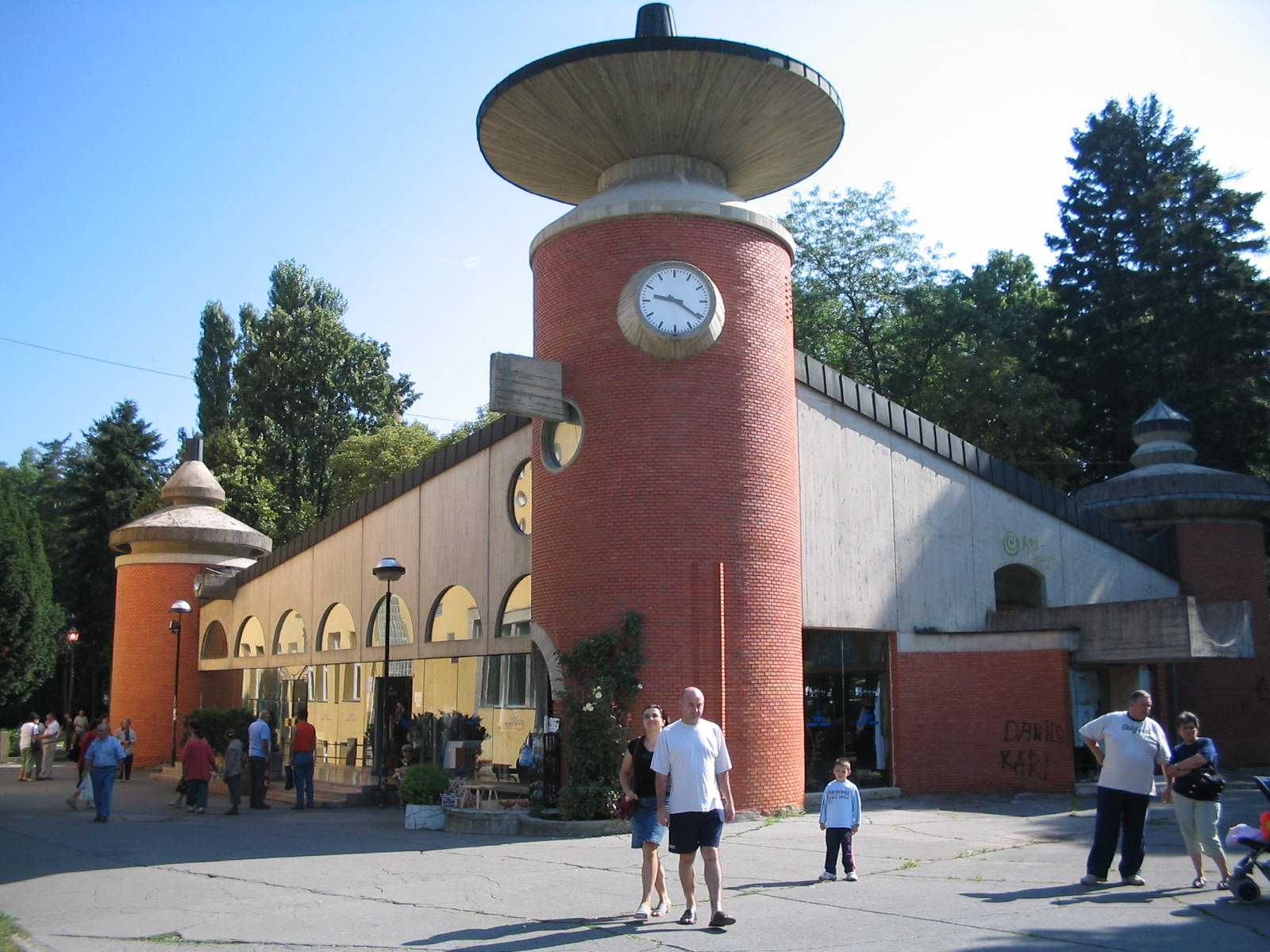 Драган Радић, аутор.